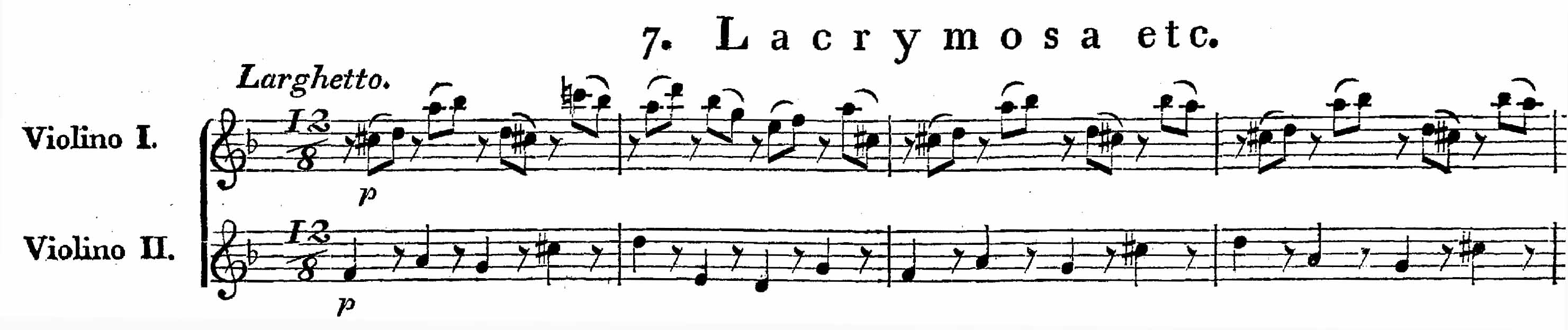 Seufzermotive am Beginn des Ladrimosa aus dem Requiem